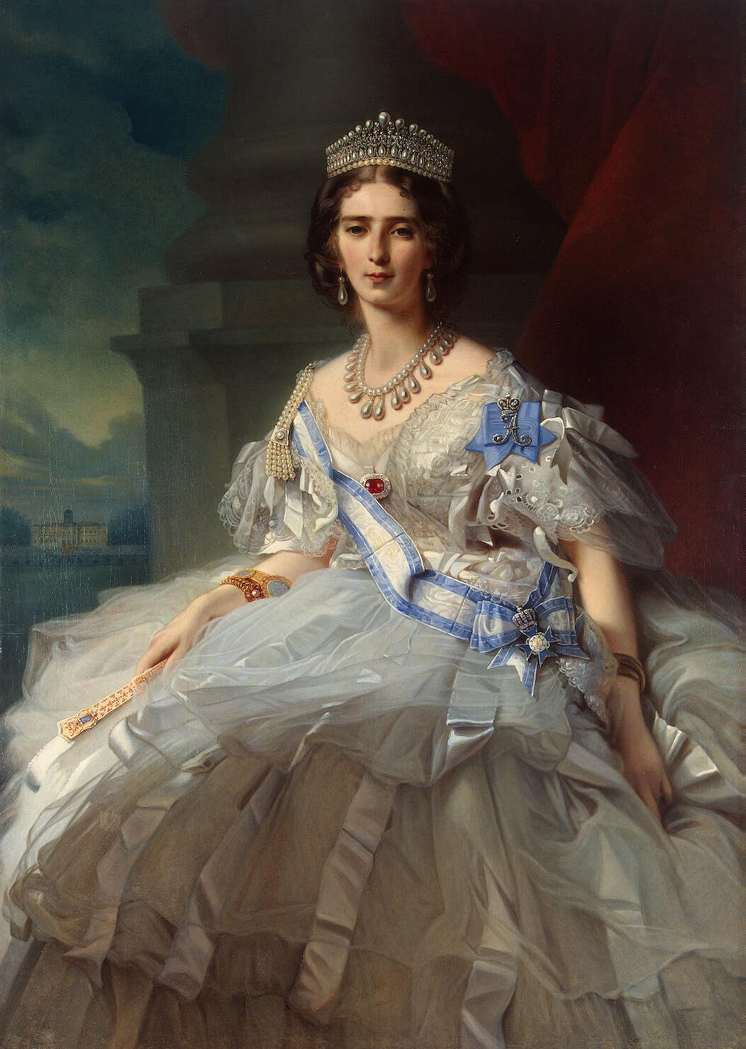 Портрет Татьяна Александровна (29.06.1829—14.01.1879) Portrait of Princess Tatiana Yussupova, née Ribаuрiеrrе (1829-1879)